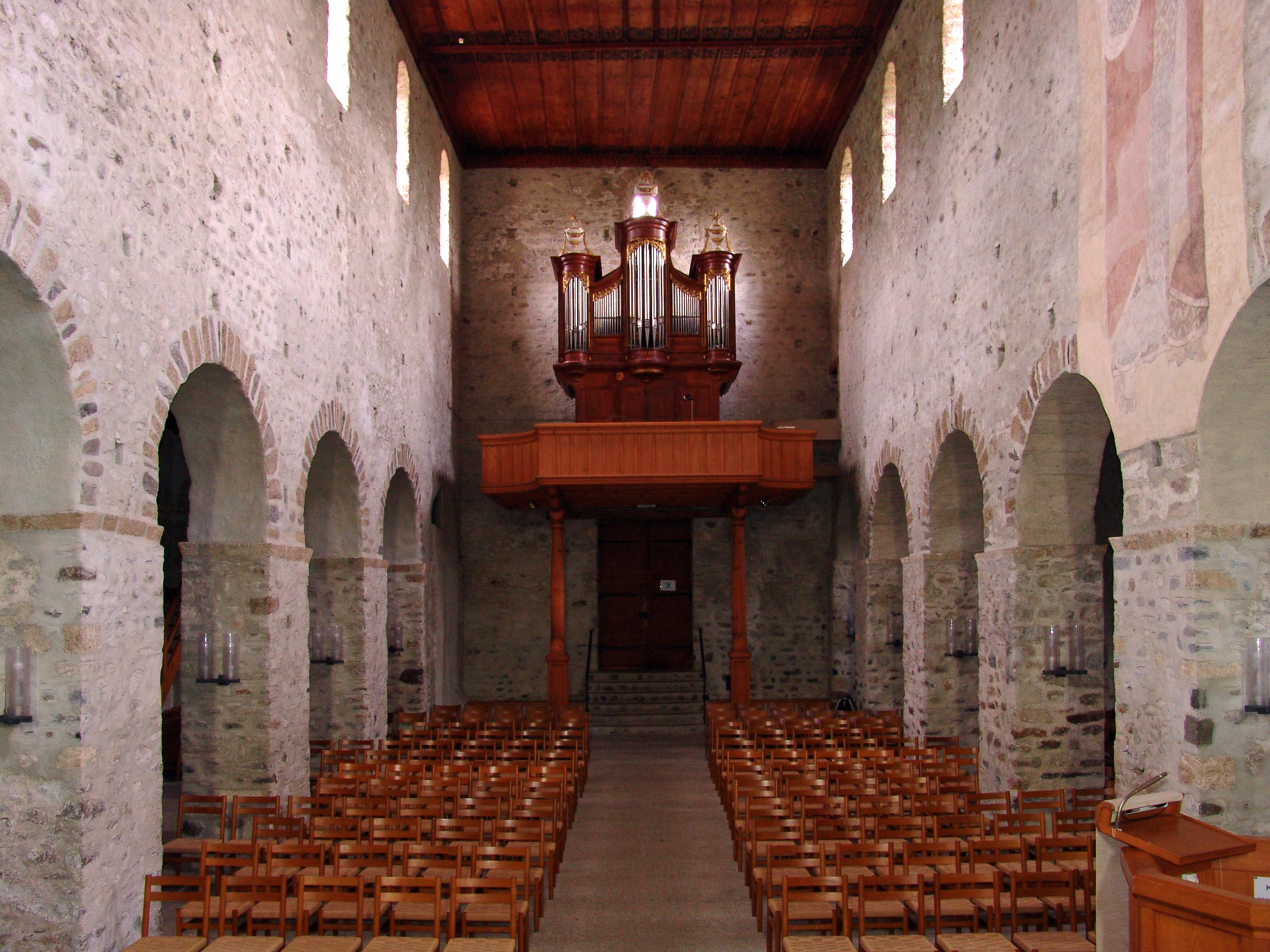 Romanische Stiftskirche Amsoldingen, Innenansicht gegen Westen, mit Orgel